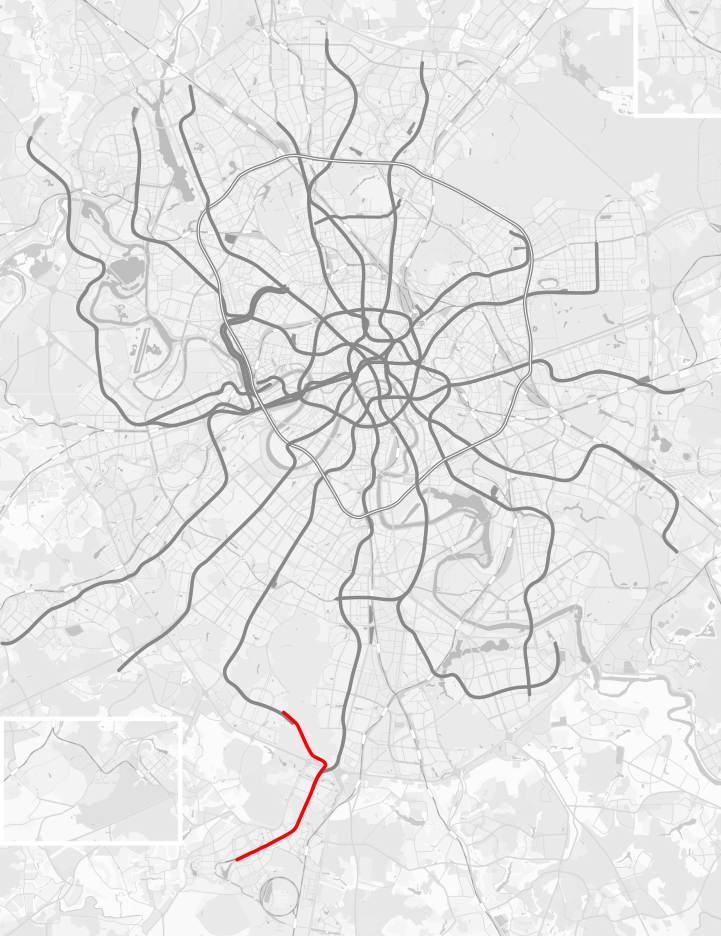 Бутовская лёгкая линия Московского метрополитена